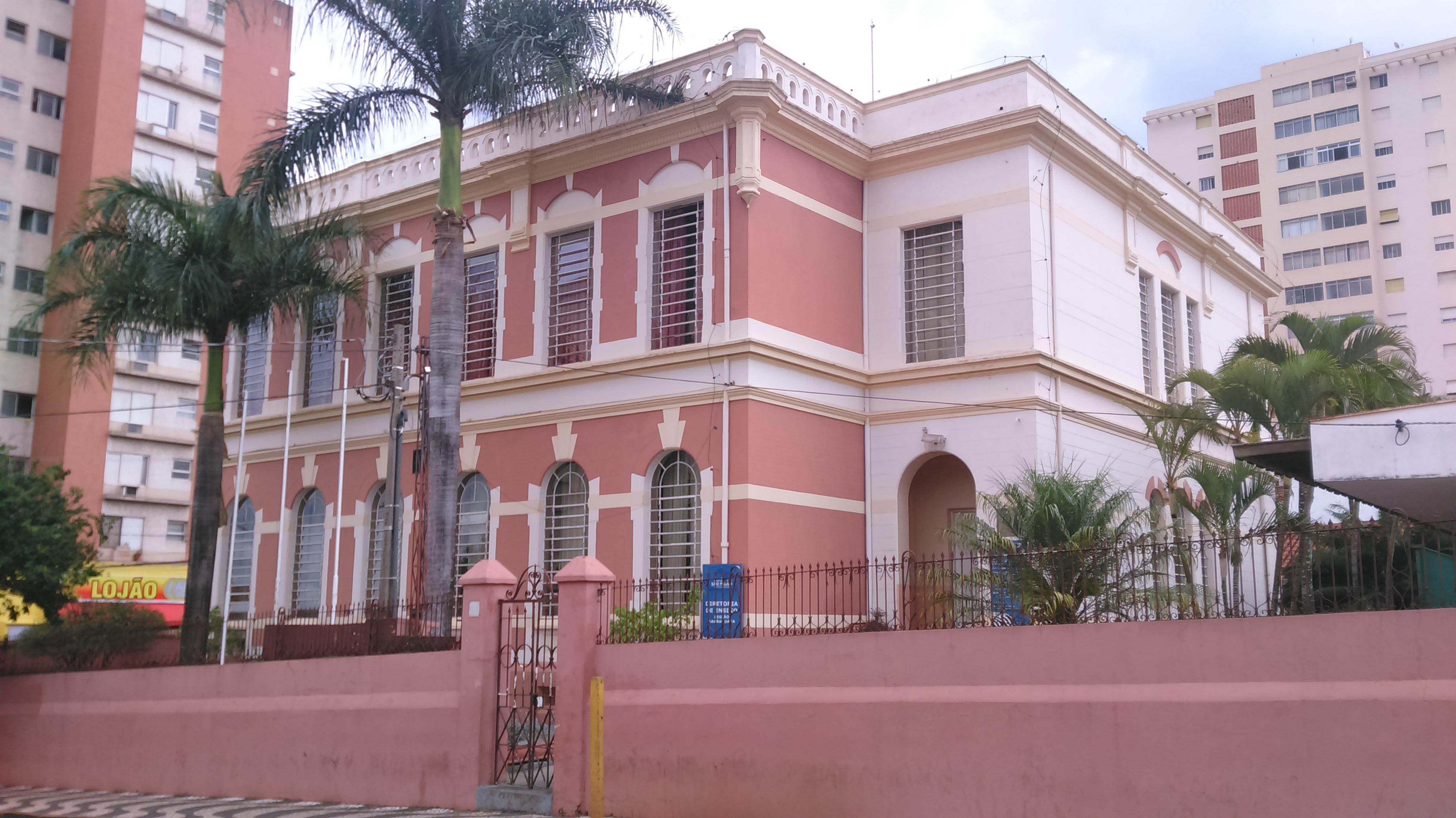 Fachada do prédio que abriga a Diretoria de Ensino de Araraquara.